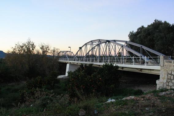 Pont de Ferro, Albalat de la Ribera